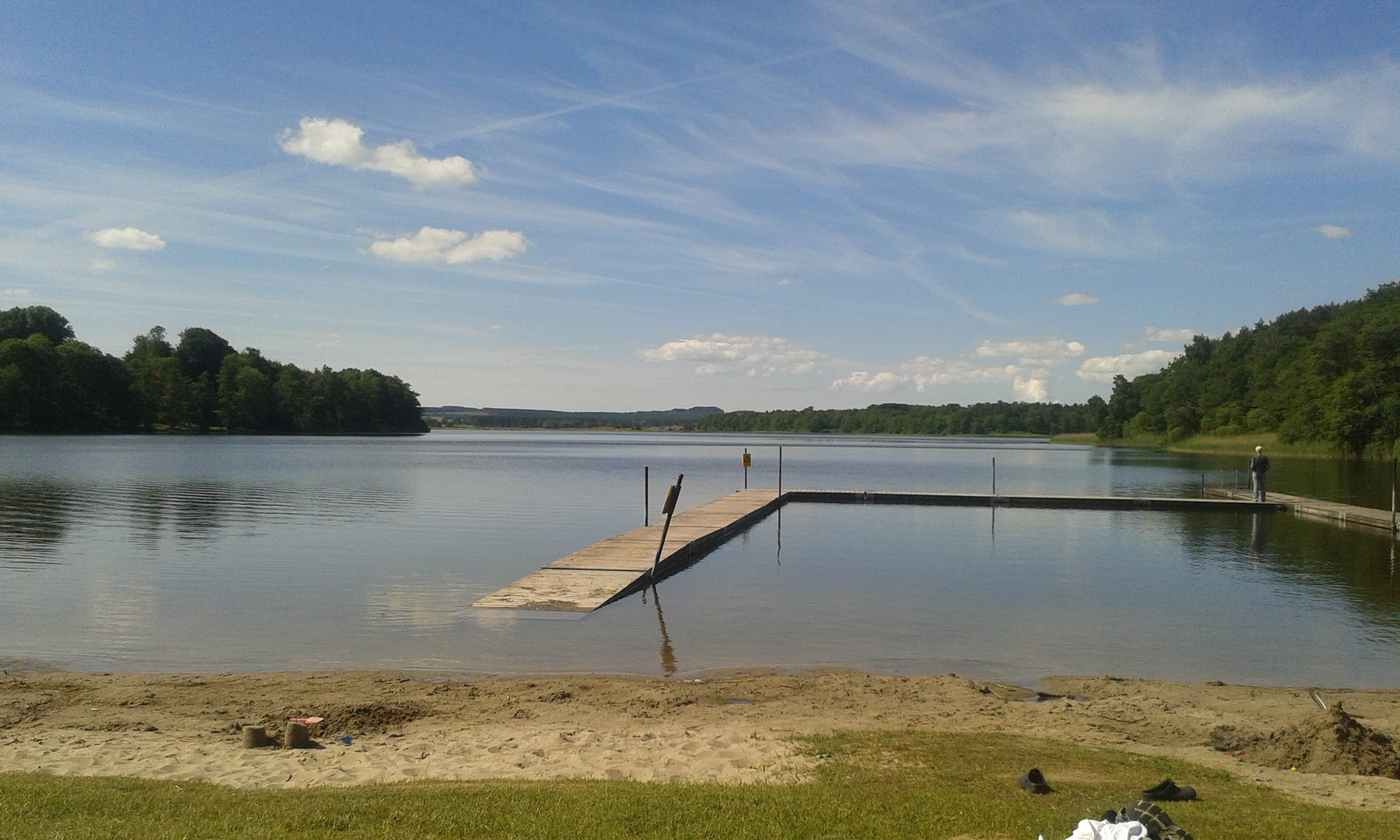 En bild på Sövdesjön tagen den 9 juni 2016.